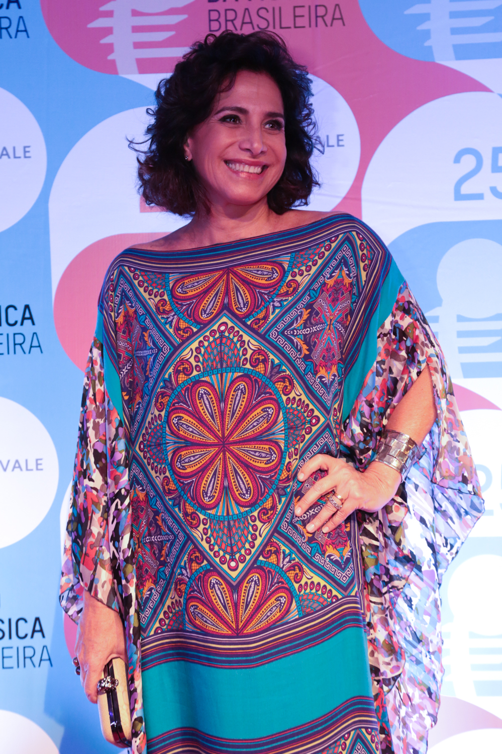 Totia Meirelles durante o 25º Prêmio da Música Brasileira no Theatro Municipal.